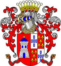 Brasão de Armas dos Condes de Ega